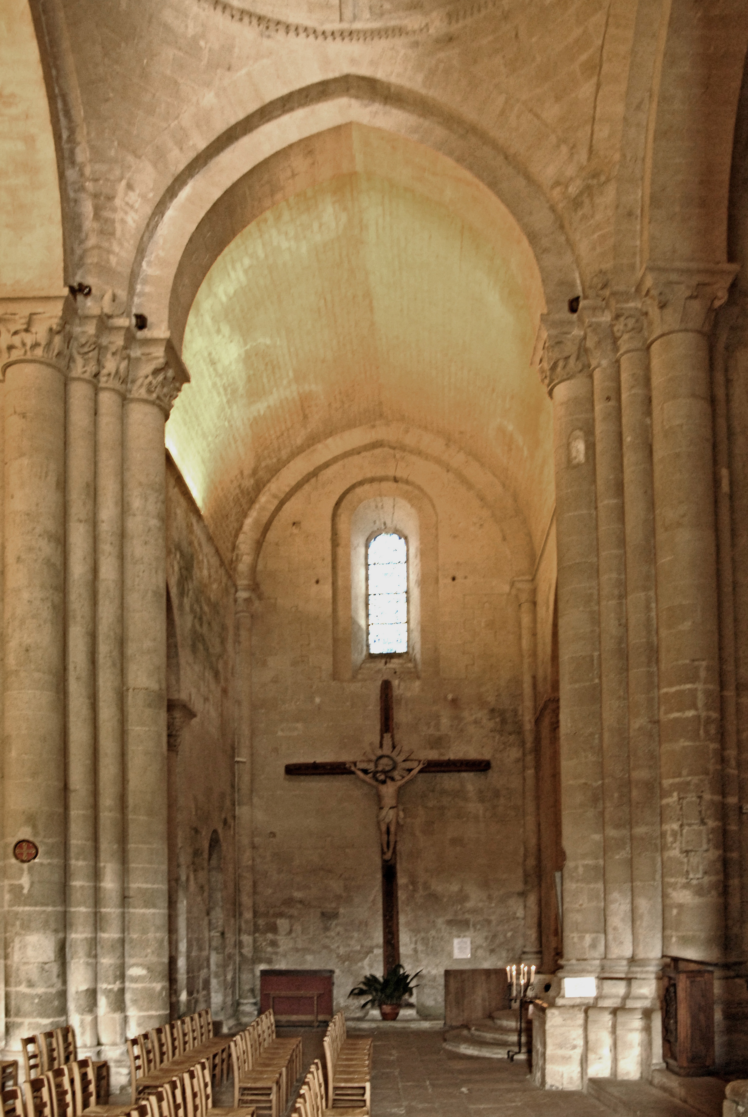 St.-Pierre Aulnay, nördl. Querhausarm